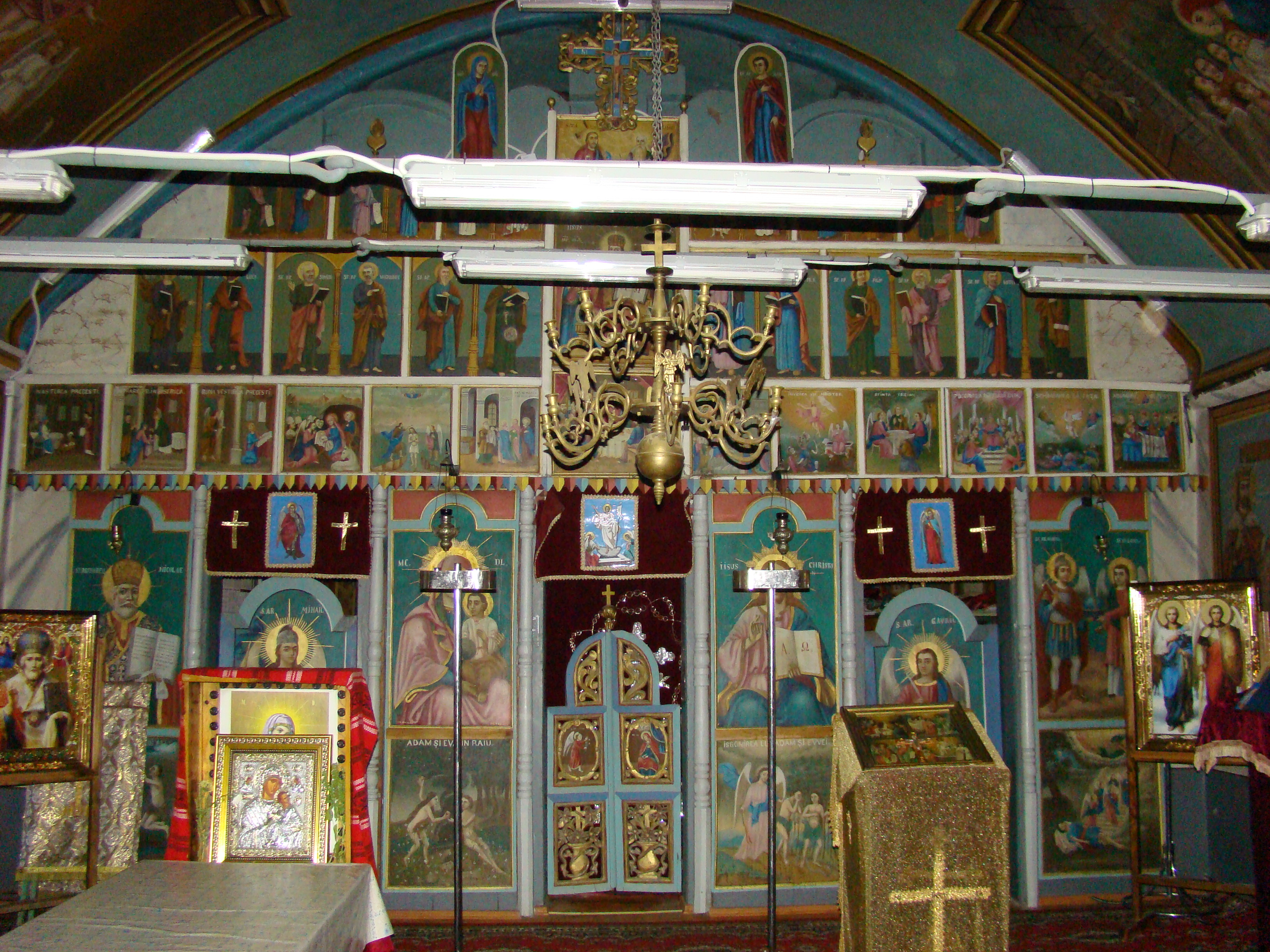 Biserica ortodoxă din Poienari, județul Gorj